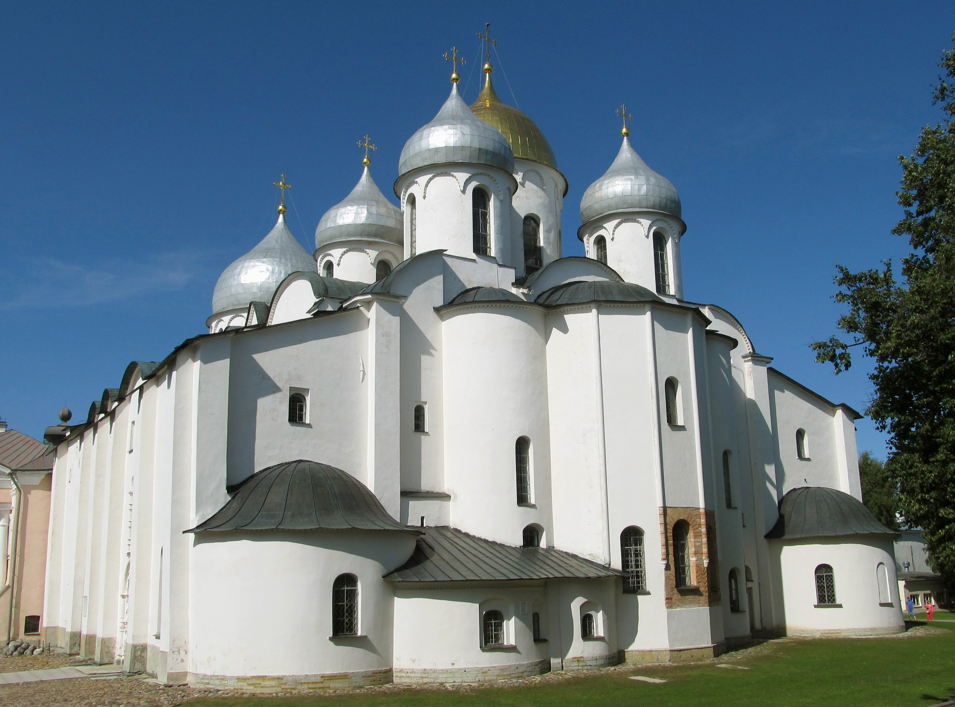 Собор Софийский: Великий Новгород, Новгородская область